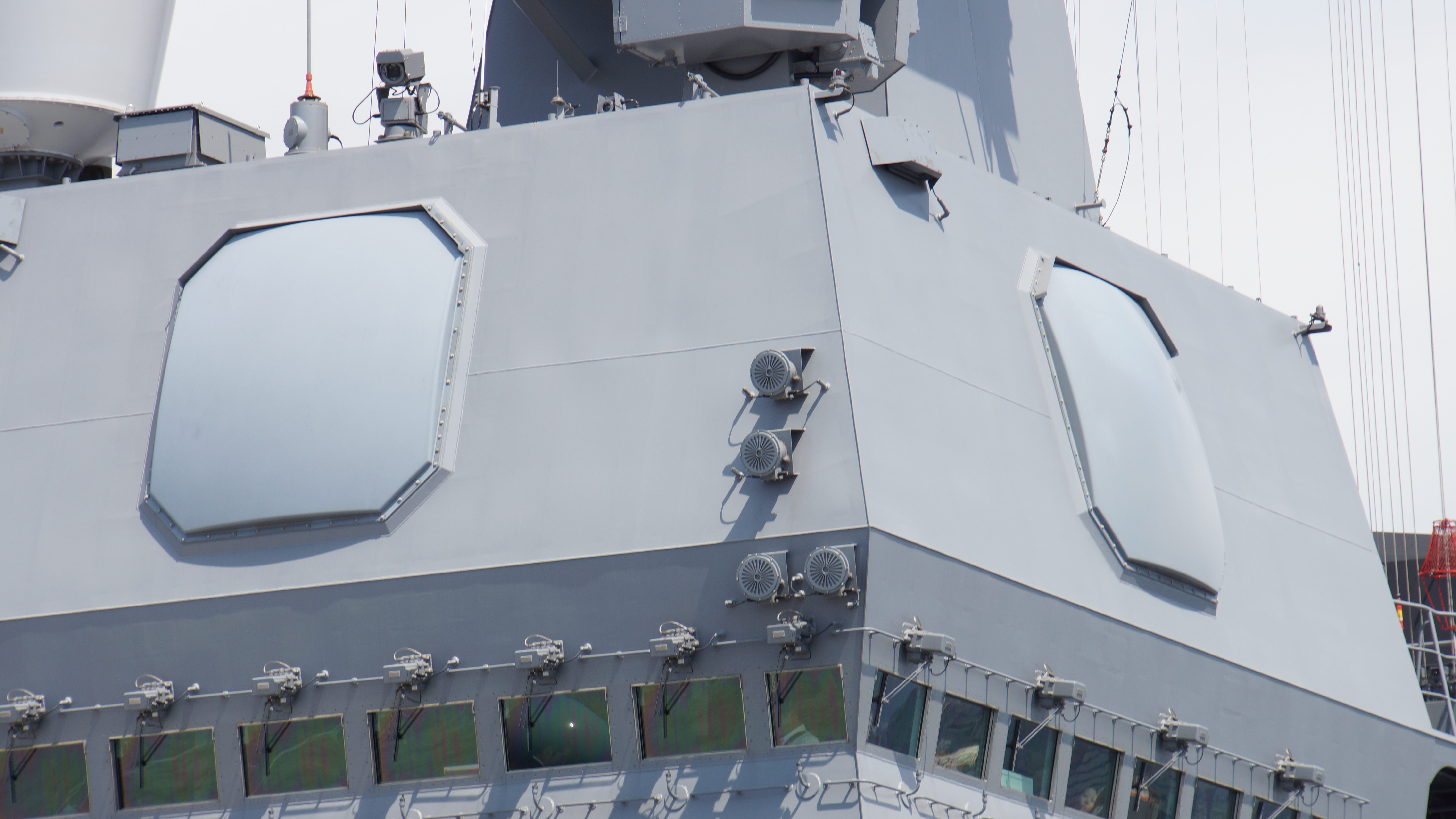 海上自衛隊 ヘリコプター搭載護衛艦かが（DDH-184） 航海艦橋上のOPS-50レーダー 左前面。2017年7月15日 金沢港にて。